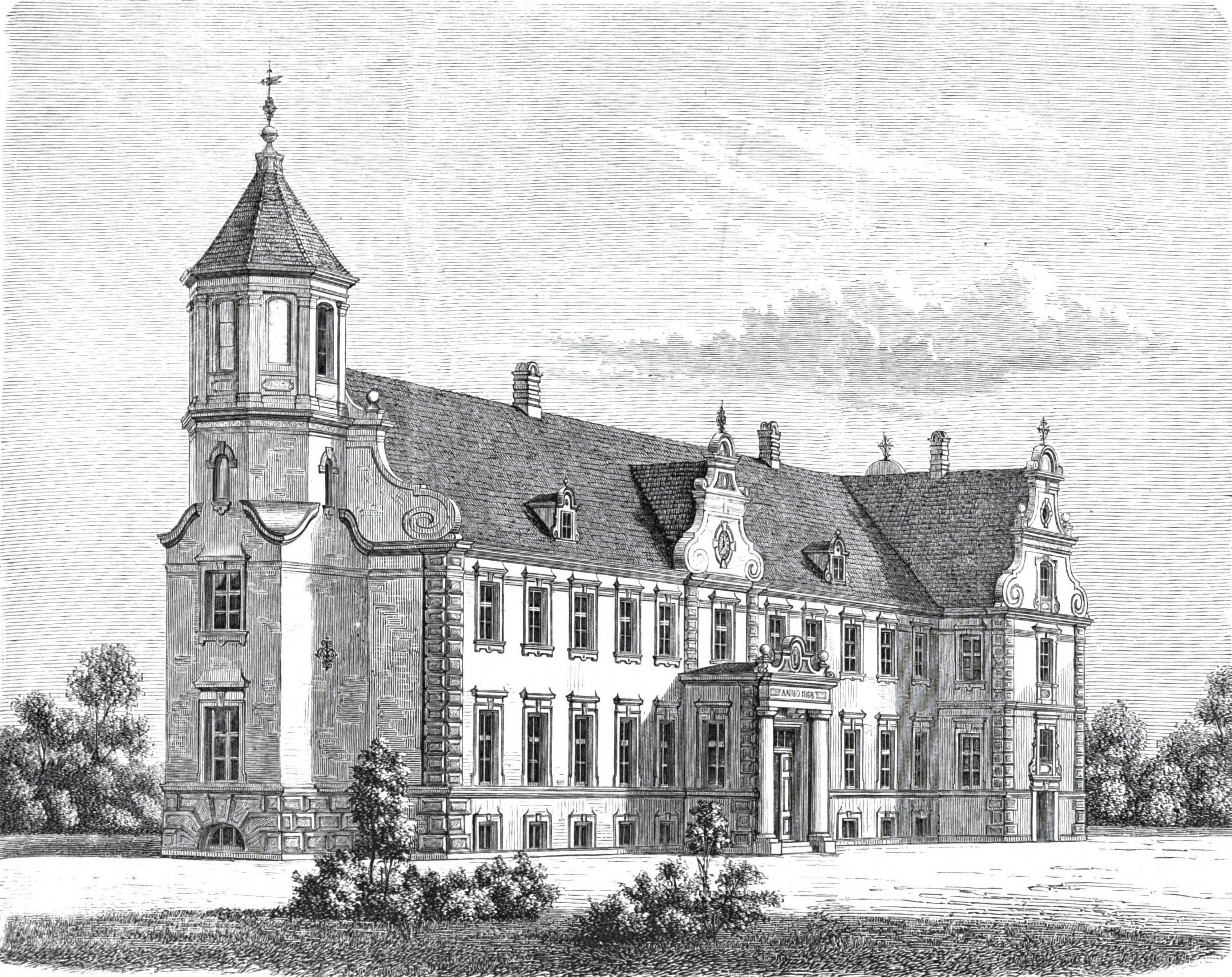 Huvudgården Søholt på Lolland, Danmark.